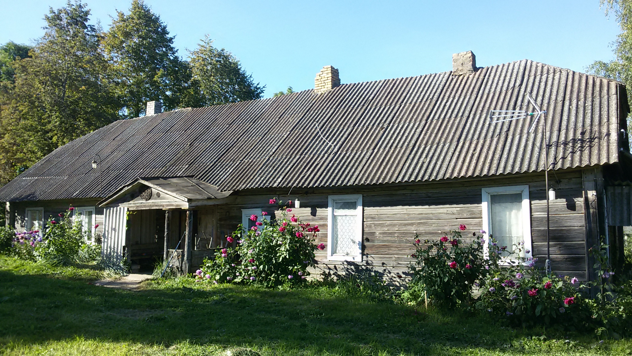 Medinis gyvenamasis namas su prieangiu. Steigvilių kaimas, Pakruojo raj. 2016 m.